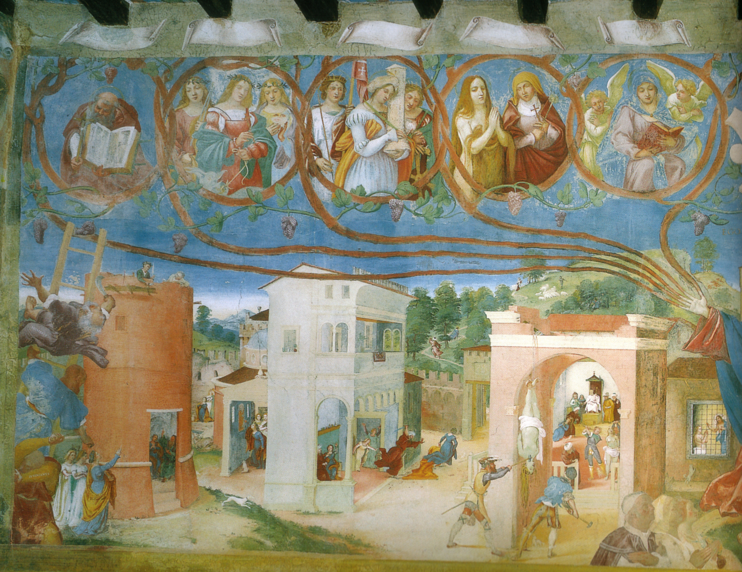 affreschi di trescore